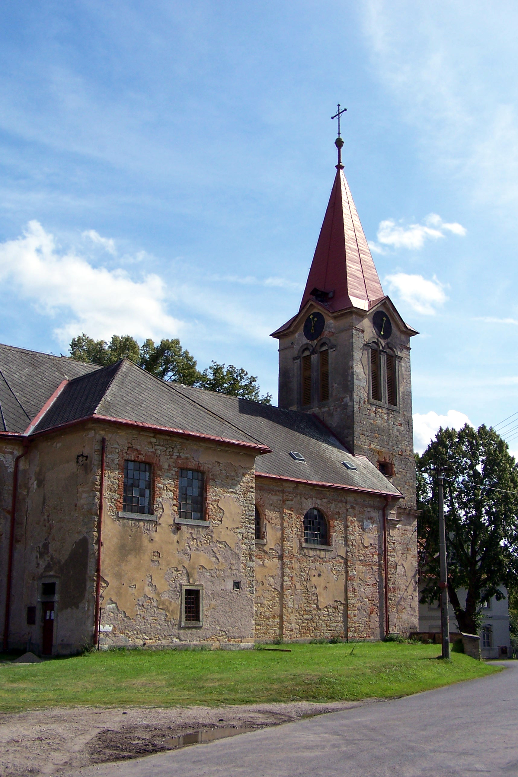 Česky: Kostel svatého Prokopa (Hořiněves)